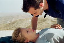 סצינה מתוך הסרט השוטר